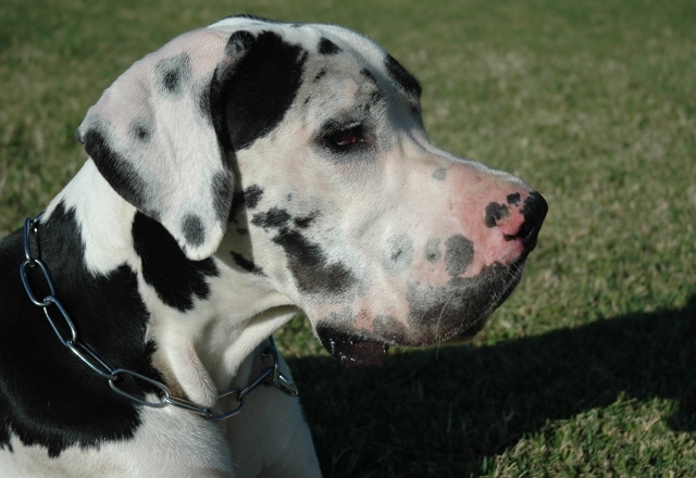 Dogue allemand arlequin "Vilar des terres de la Rairie" alias Vik